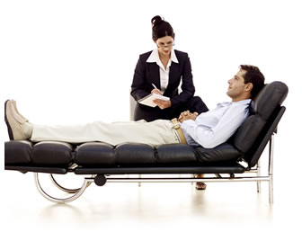 Pacient parlant amb la terapeuta.